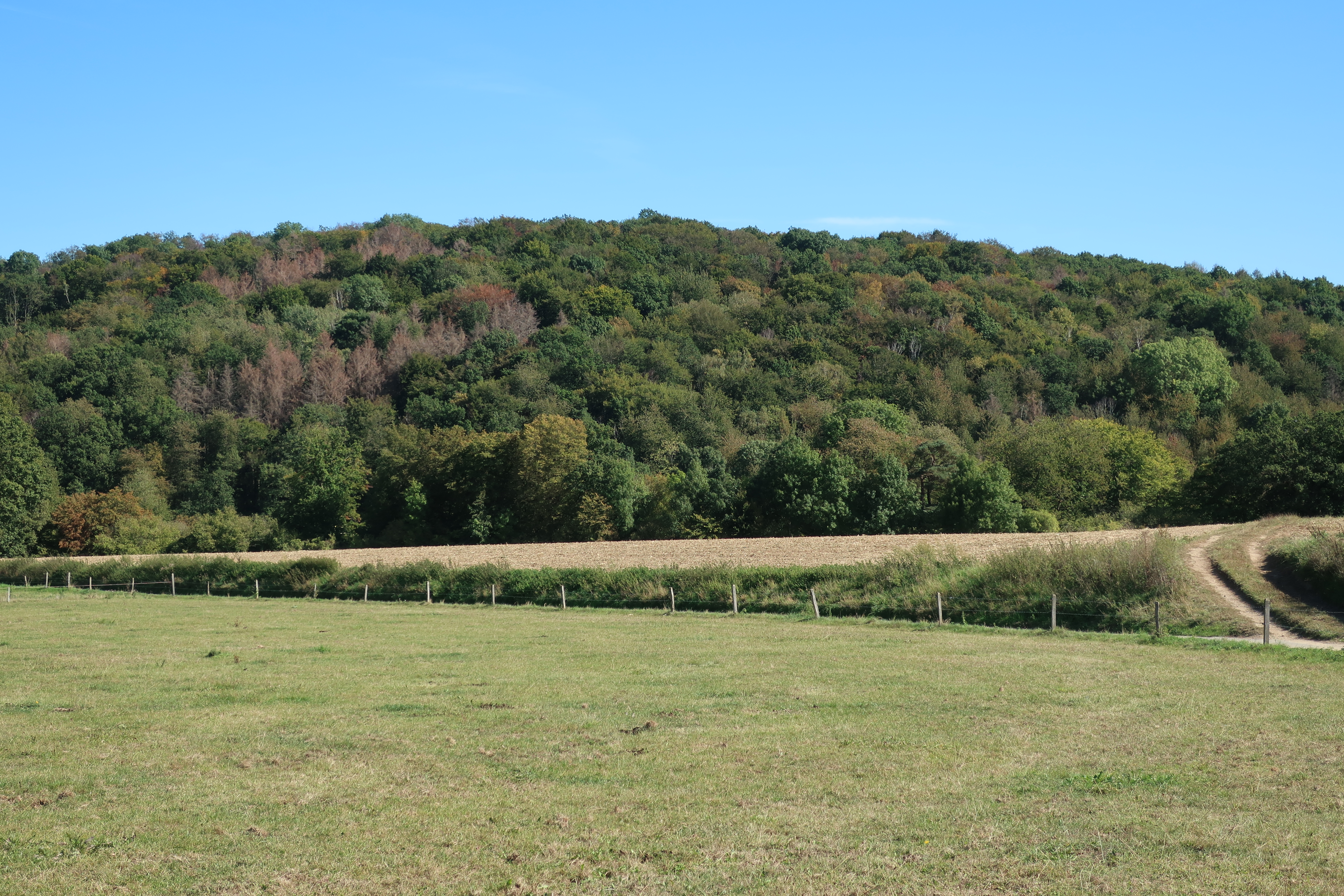 Landschaftsschutzgebiet „Berchumer Heide, Reher Heide“ in Hagen-Berchum und Hohenlimburg-Reh. Blick vom Blumenkampe in Berchum auf den im Hintergrund liegenden Rehberg (229 m) in Hohenlimburg-Reh. Auf dem Foto am Waldhang rechts befindet sich der geschützte Landschaftsbestandteil 1.4.2.27 „Buchenwald Rehberg“. Es handelt sich überwiegend um alten Buchenwald mit artenreicher Krautschicht sowie um einen Quellbereich.